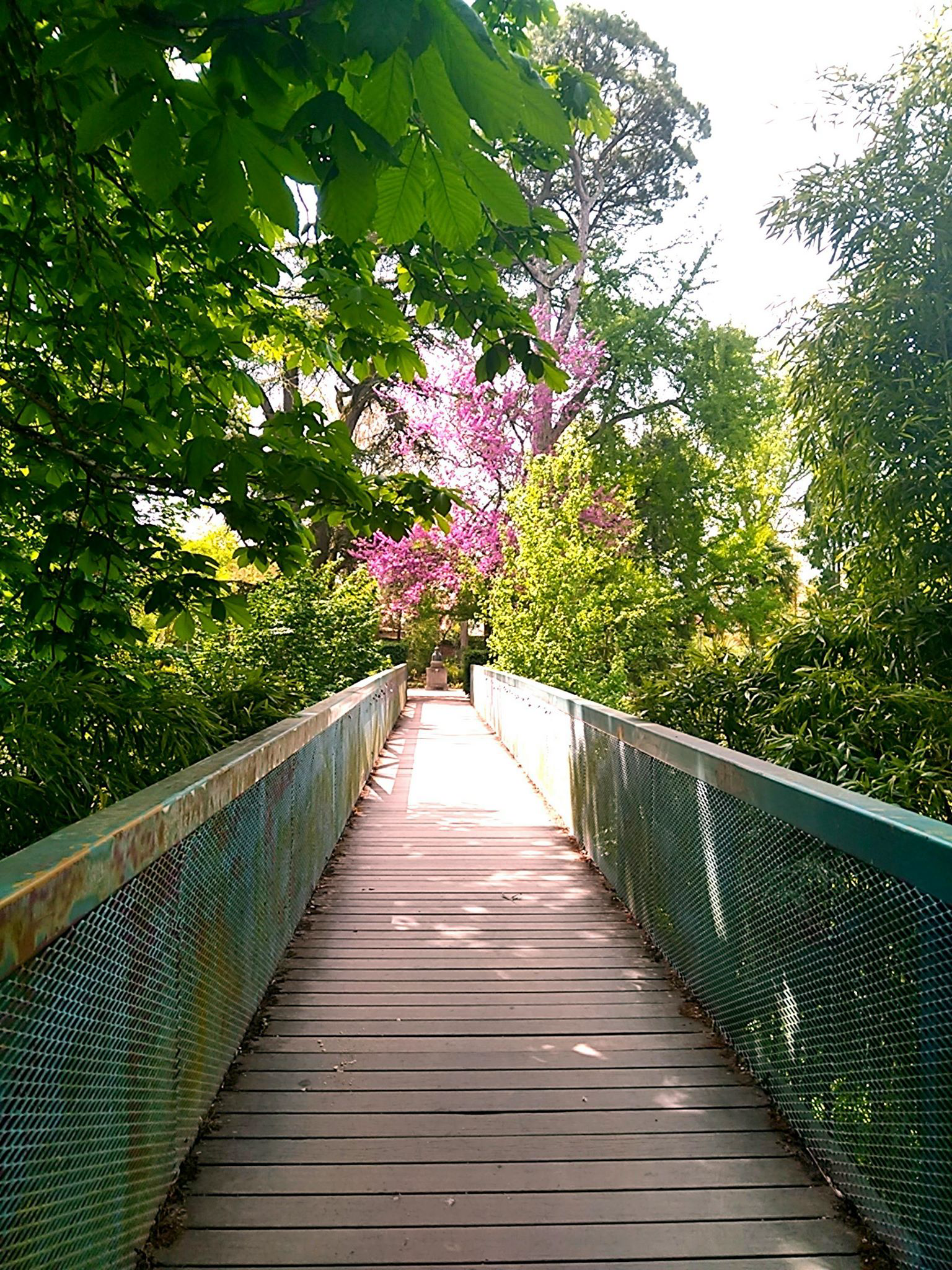 Pont des jardins des plantes de Montauban.